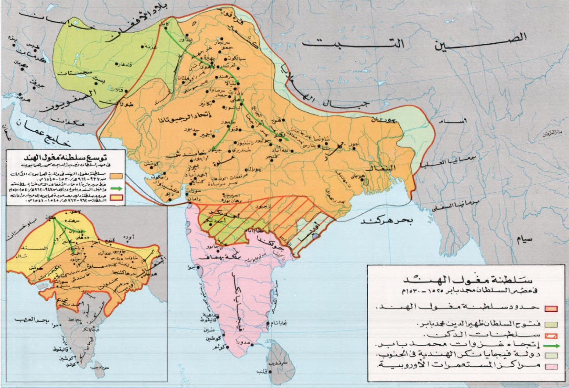 خريطة سلطنة مغول الهند في عصر السُلطان مُحمَّد بابُر وخليفته همايون.